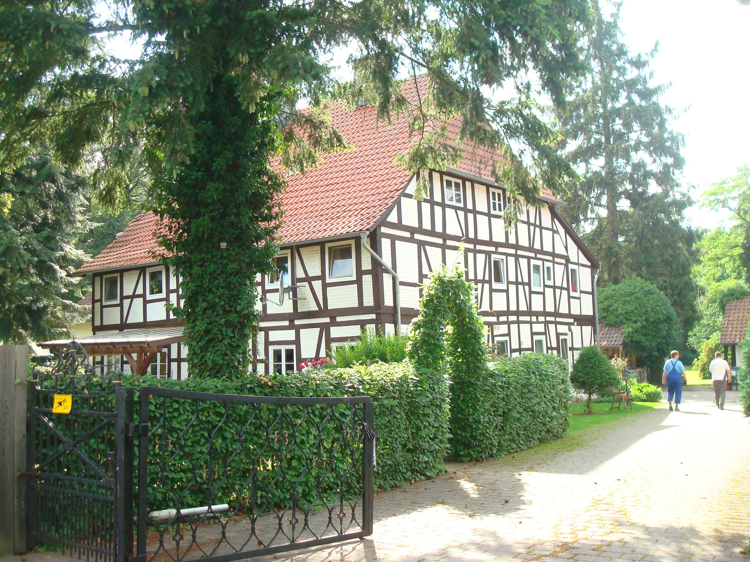 Ehemaliges Gutshaus in Triangel